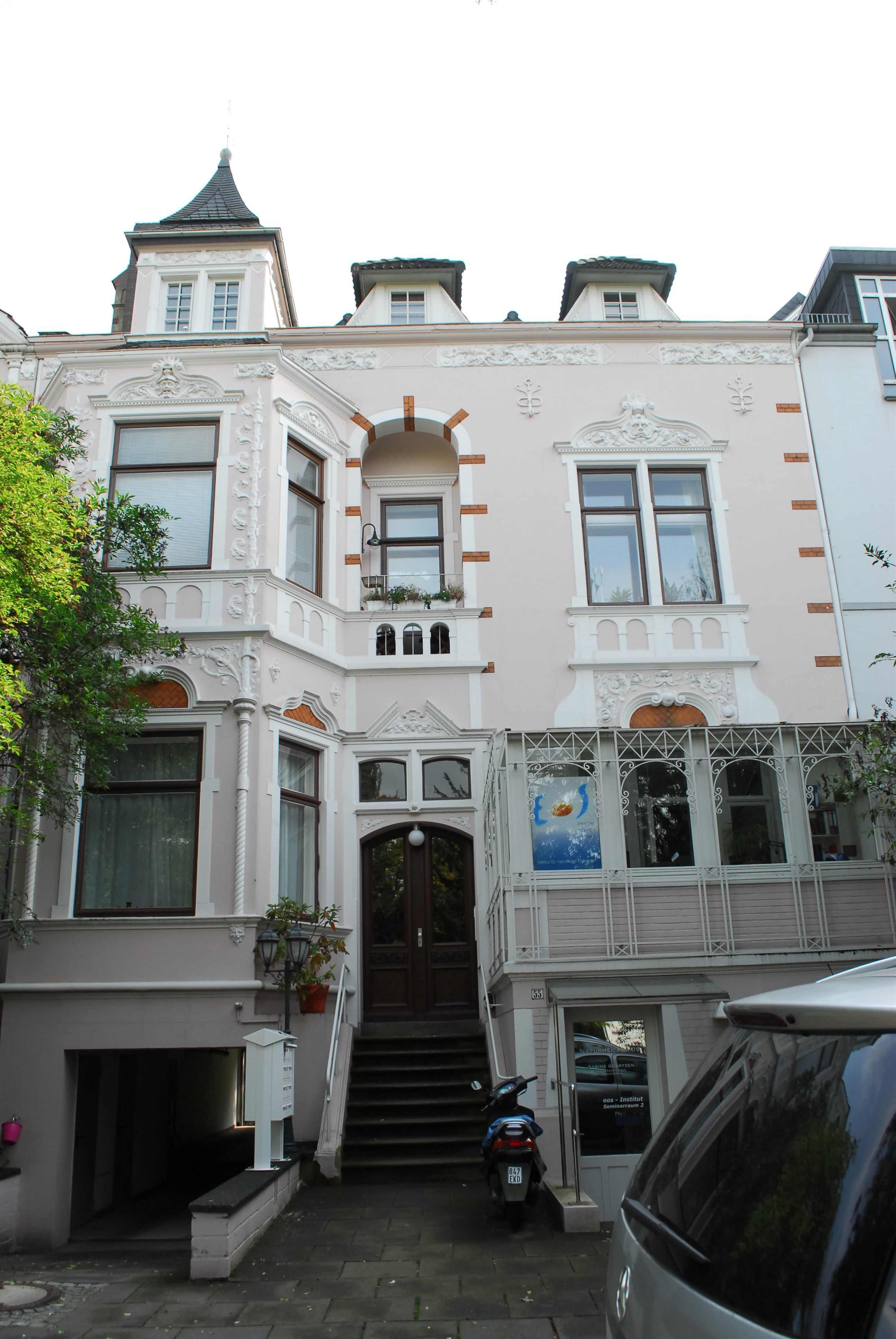 Wohnhaus in Bremen, Schwachhauser Heerstraße 55.Das abgebildete Objekt ist ein geschütztes Kulturdenkmal in der Freien Hansestadt Bremen, mit der Nr. 1118 beim Landesamt für Denkmalpflege registriert.